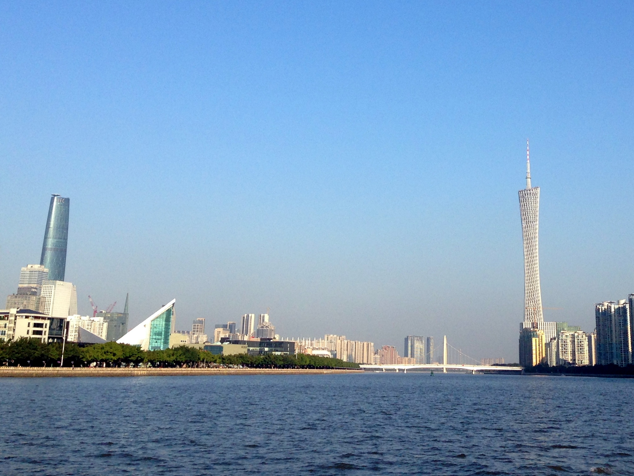 二沙島以南的珠江，左側島上有星海音樂廳，遠處可見廣州塔。